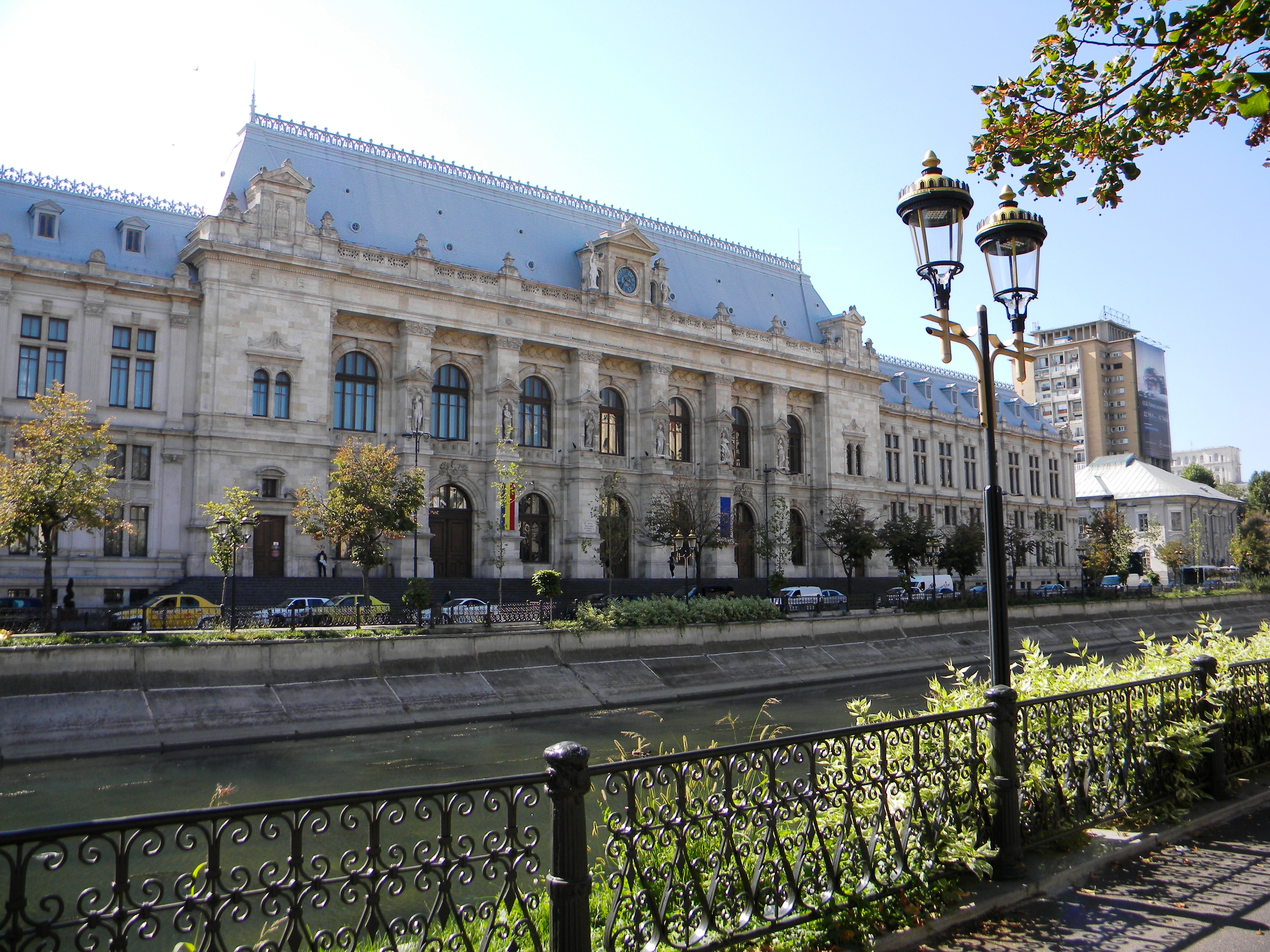 Bucuresti, Romania, Palatul de Justitie (Arhitecti Albert Ballu si Ion Mincu); B-II-m-A-18941 (3)